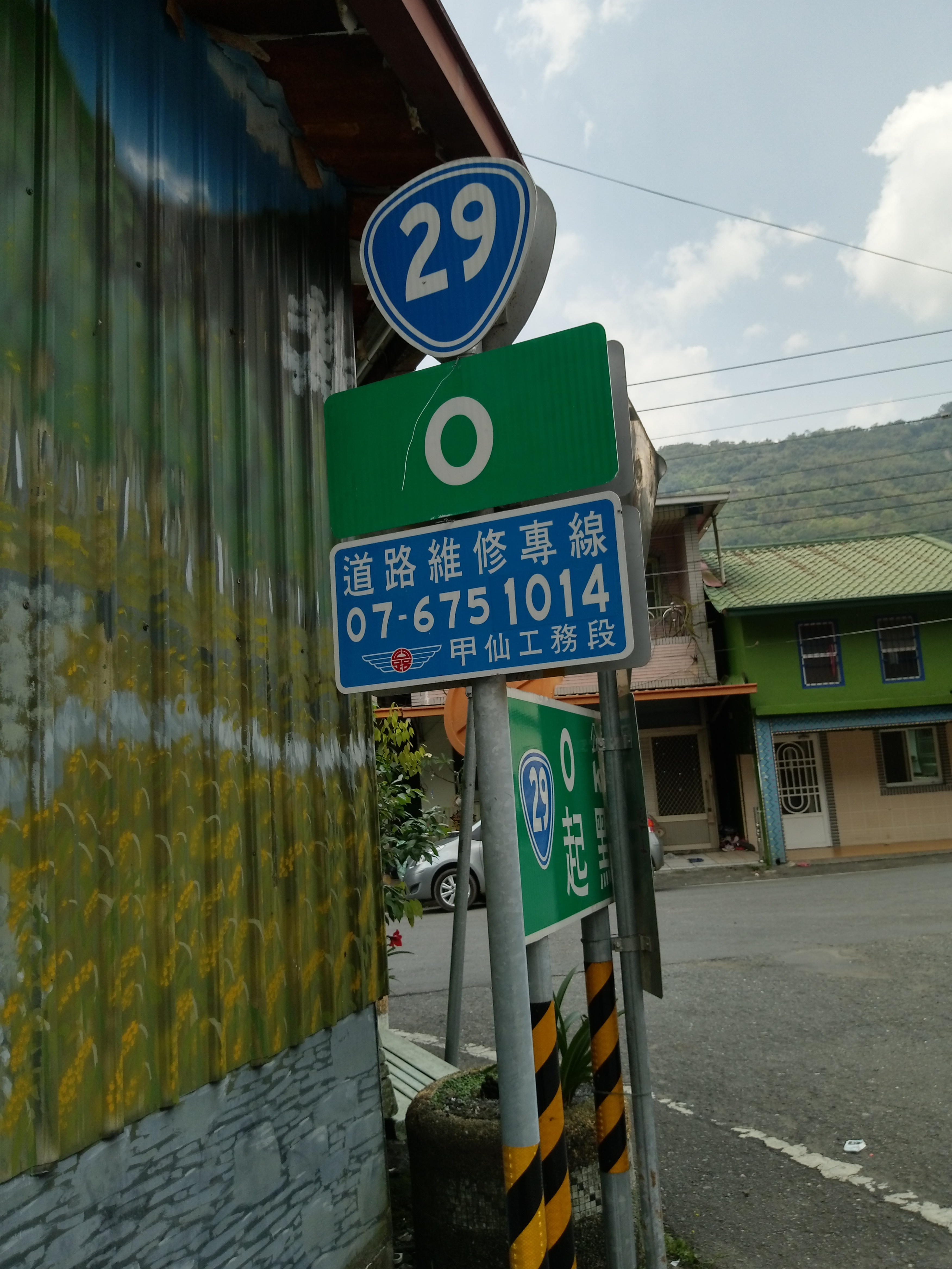 臺灣省道臺29線起點牌與0公里里程牌